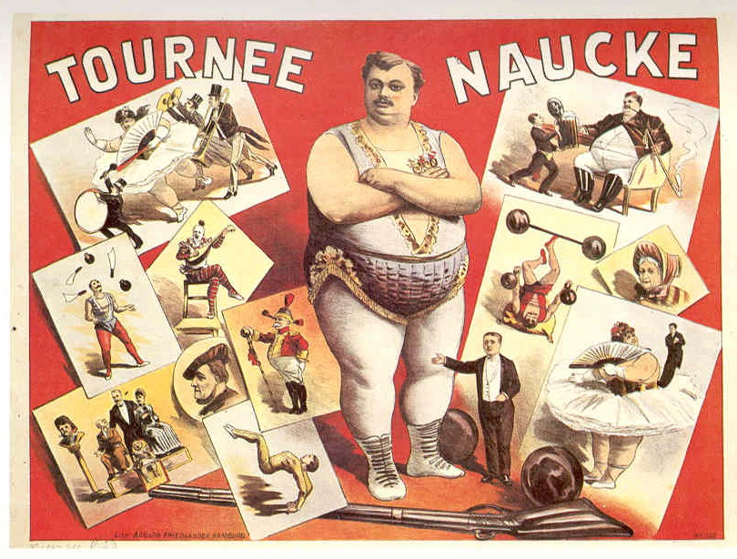 Tournee Naucke. Farblithographie